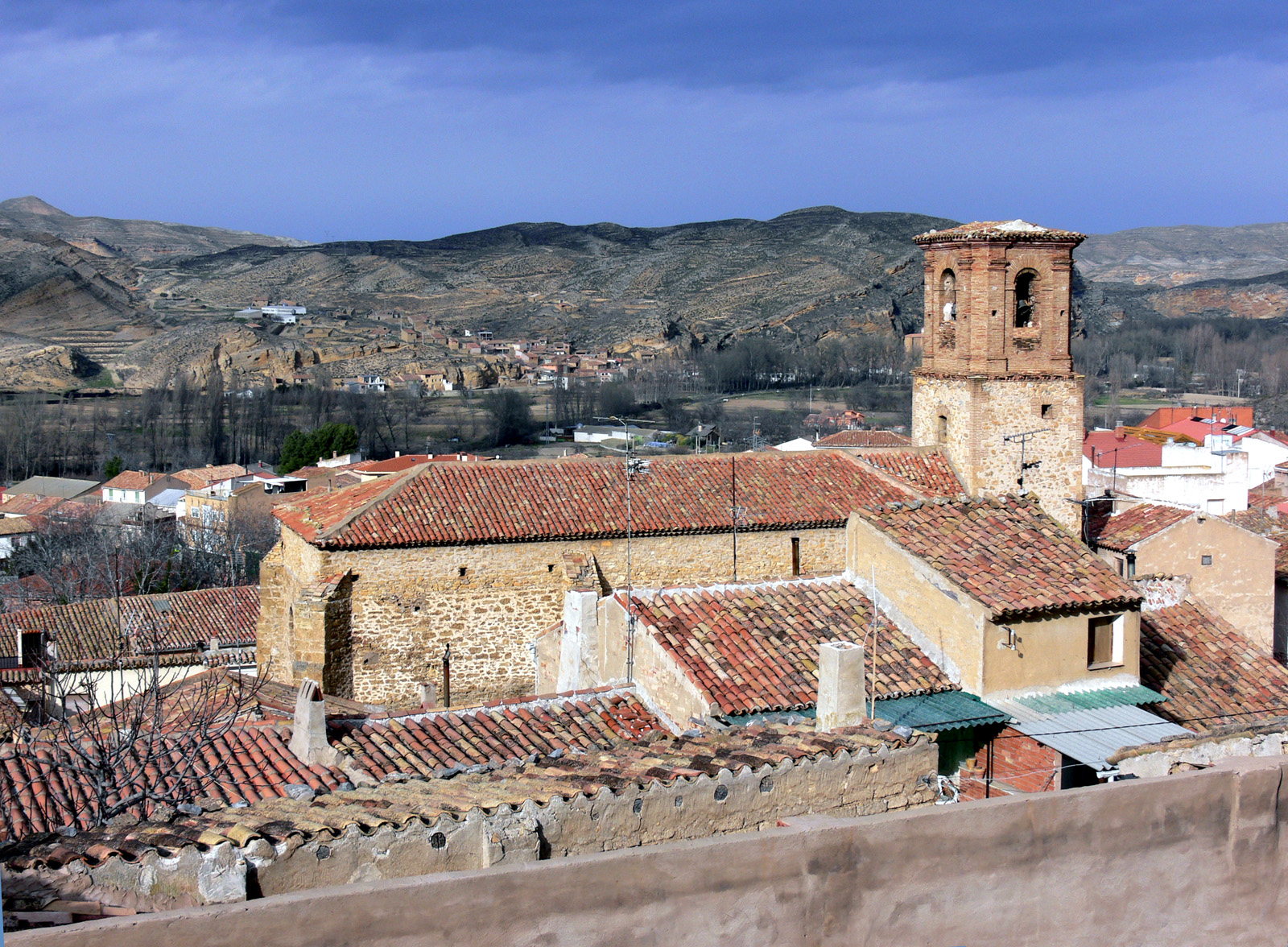 Iglesia de la Asuncion (sXVI) y Sierra del Tormo.